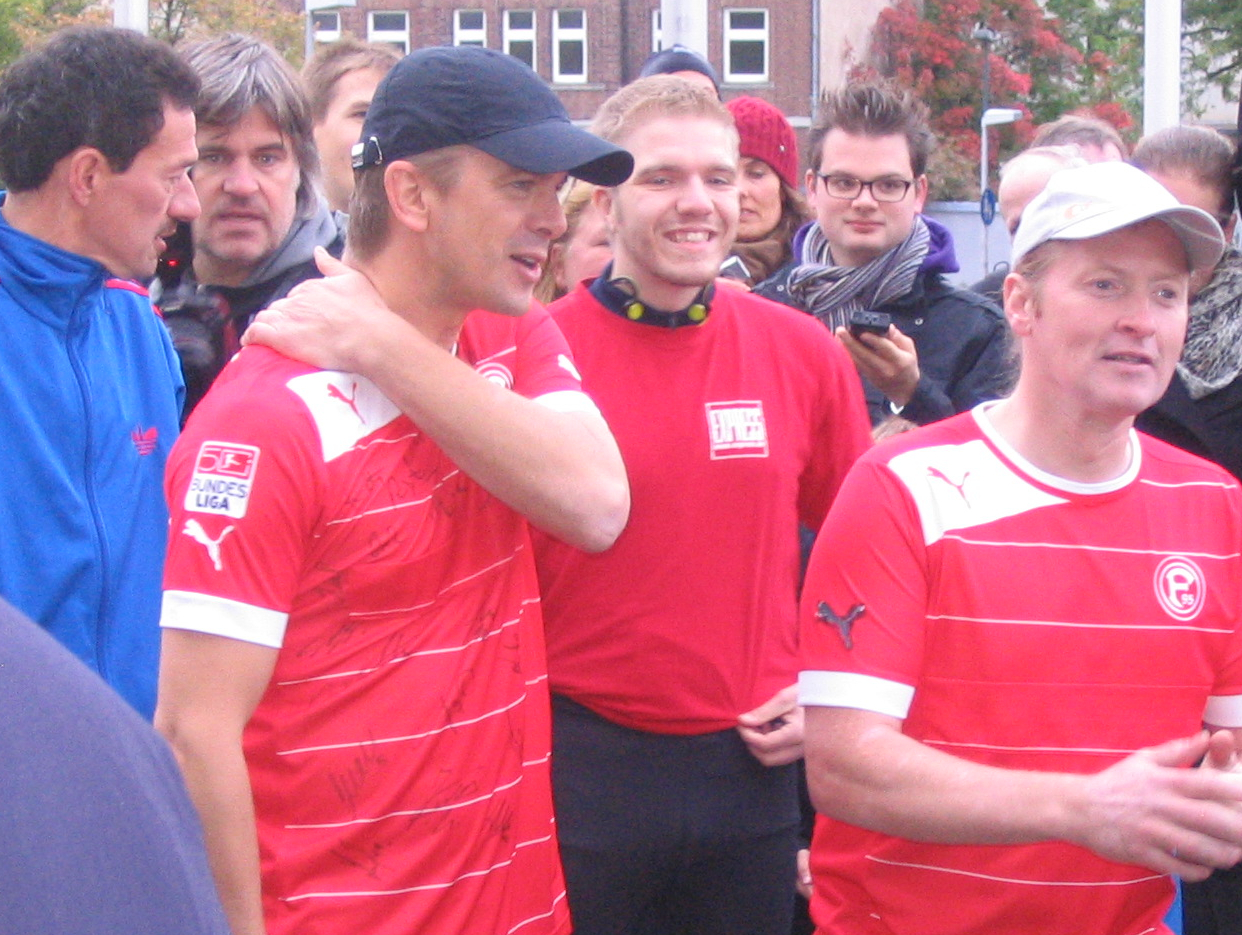 „Wetten, dass..?“ Nachdem Fernsehmoderator Markus Lanz am vorausgegangenen Wochenende in Düsseldorf die Stadtwette verloren hat, löste er am Sonntag dem 14. Oktober um 9 Uhr 30 seine Wettschuld ein. Er lief im Trikot des Fußballvereins Fortuna Düsseldorf vom Düsseldorfer Landtag nach Köln und einmal um den Kölner Dom, zusammen mit Joey Kelly. - Vor dem Start am Landtag. Links, in roten T-Shirts, Markus Lanz, Mitte EXPRESS-Reporter Bernd Peters, rechts Joey Kelly